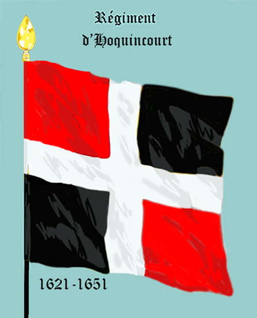 Ordonnanzfahne eines königlich französischen Infanterie-Regiments. - Entnommen und überarbeitet aus: „LES UNIFORMES ET LES DRAPEAUX DE L'ARMÉE DU ROI“ Marseille 1899. (Drapeau d'ordonnance d' un régiment française d'infanterie royale.)